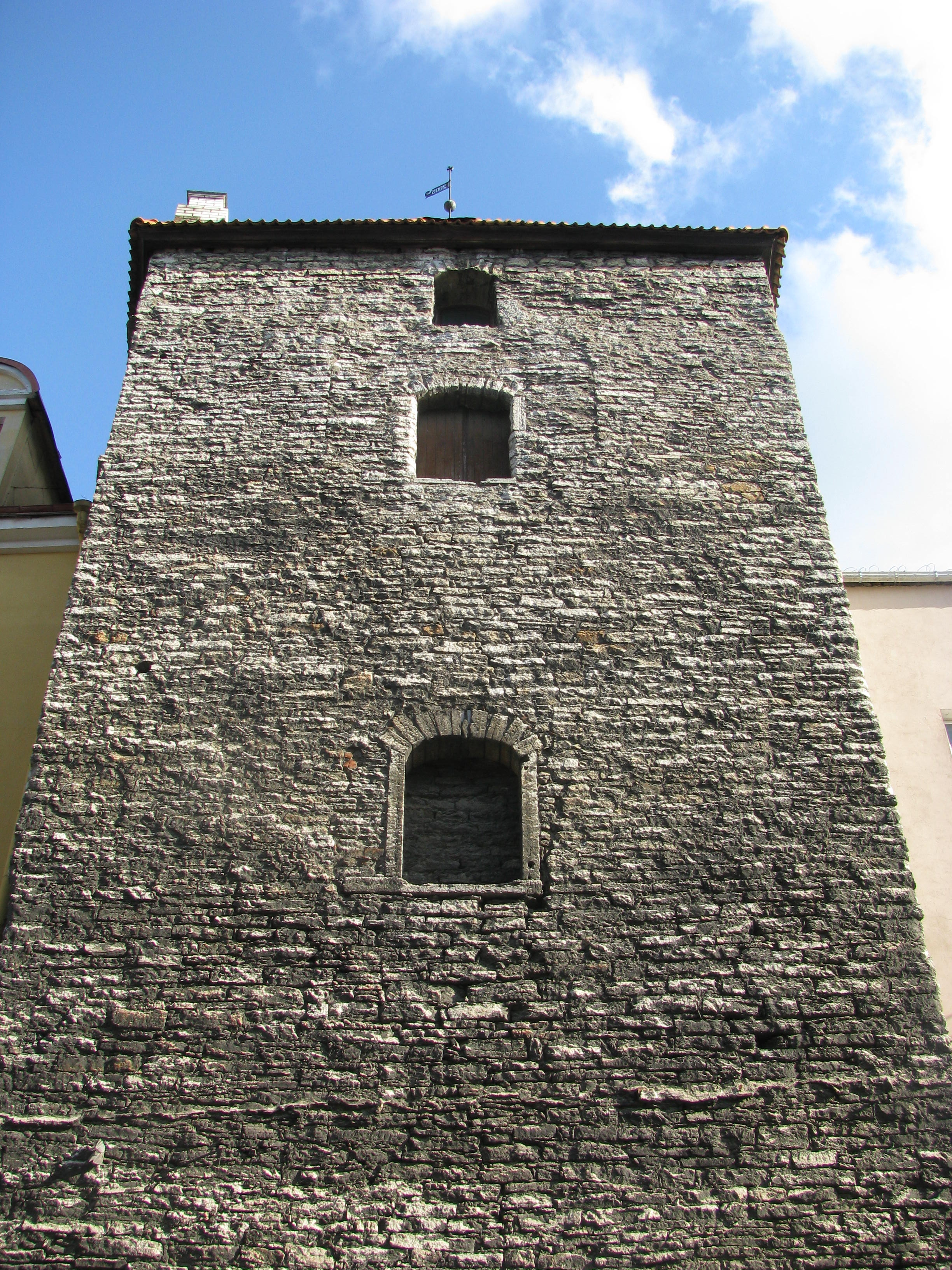 Assauwe torn Müürivahe tänaval, vaade alt.